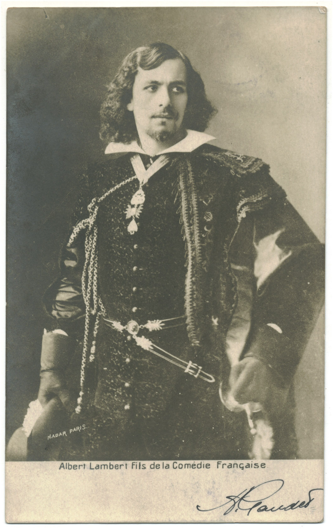 LAMBERT, Albert. Fils_Sin datos. Comédie Française. Photo Nadar